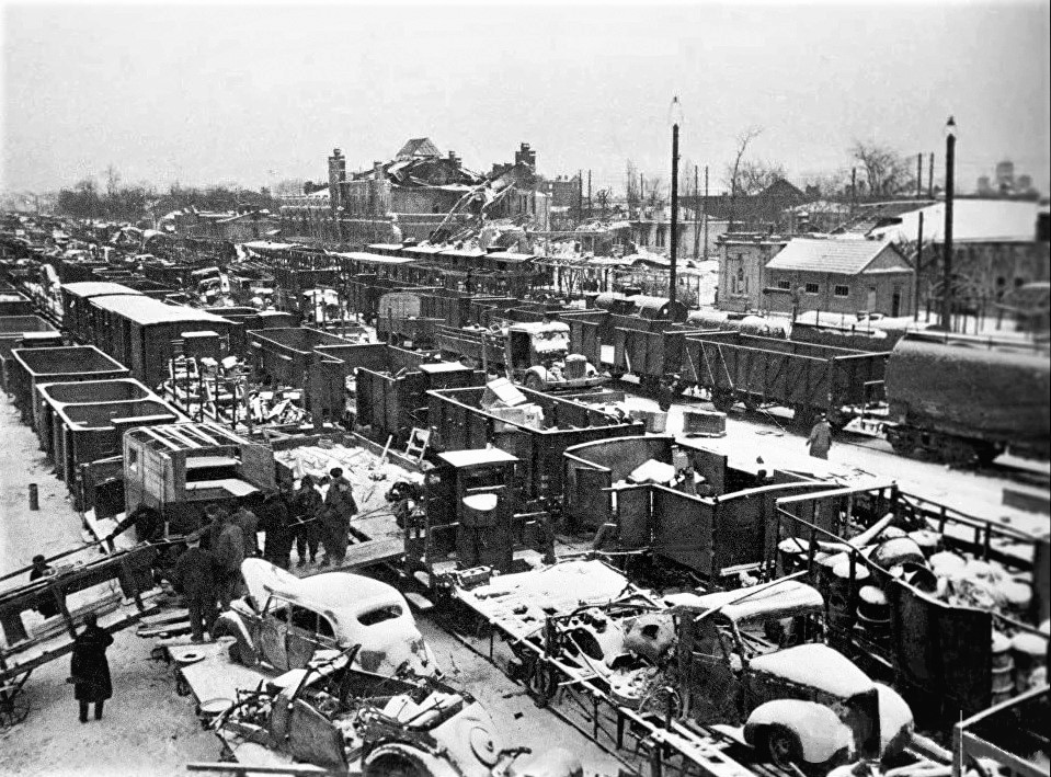 Станция Кавказская после освобождения